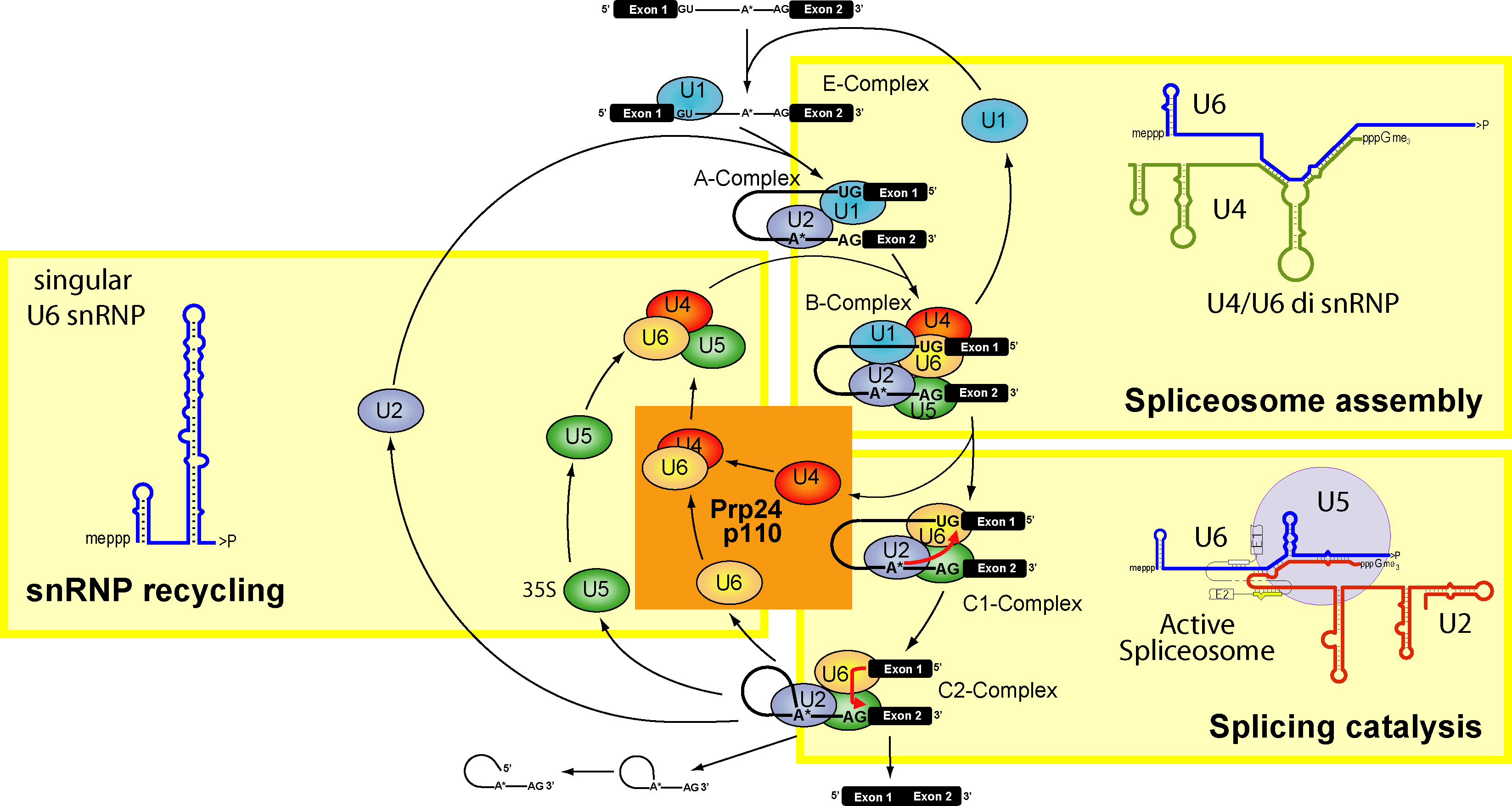 Splicéosome